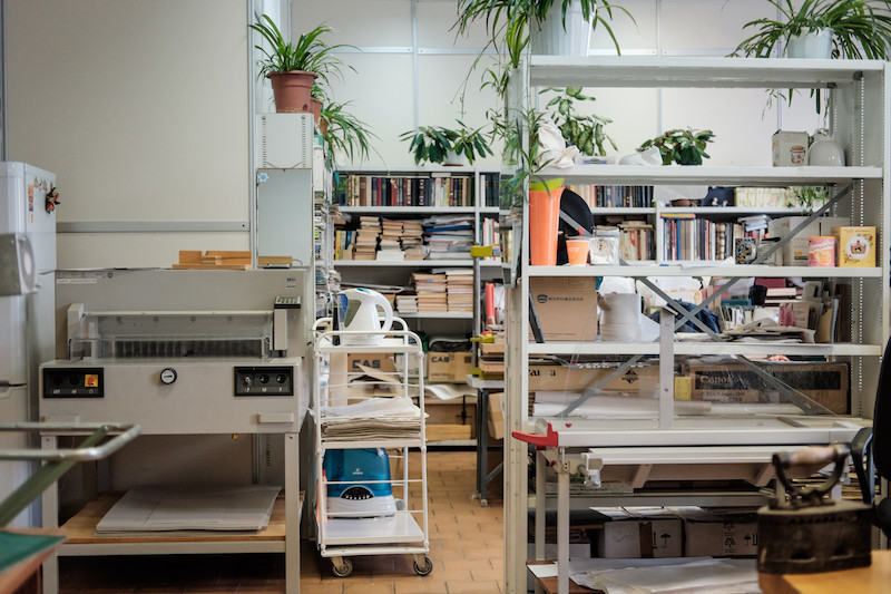 Государственное бюджетное учреждение культуры г. Москвы «Центральная универсальная научная библиотека имени Н.А. Некрасова» Главное здание Библиотеки им. Н.А. Некрасова 105005, Москва, ул. Бауманская, д. 58/25, стр. 14 (м. «Бауманская»)